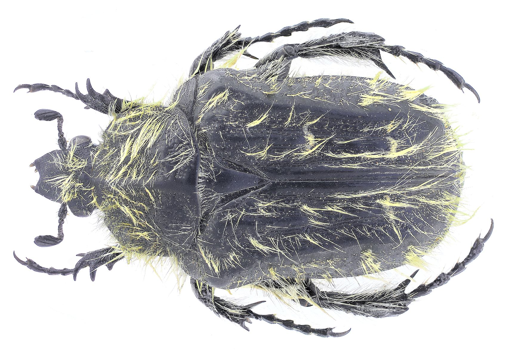 Familie: Scarabaeidae Groesse: 8-14 mm Verbreitung: Nordafrika Ökologie: Entwicklung im morschen Holz von Laubbäumen Fundort: Marokko, Marrakech leg.det. U.Schmidt, 1995 Photo: U.Schmidt, 2005